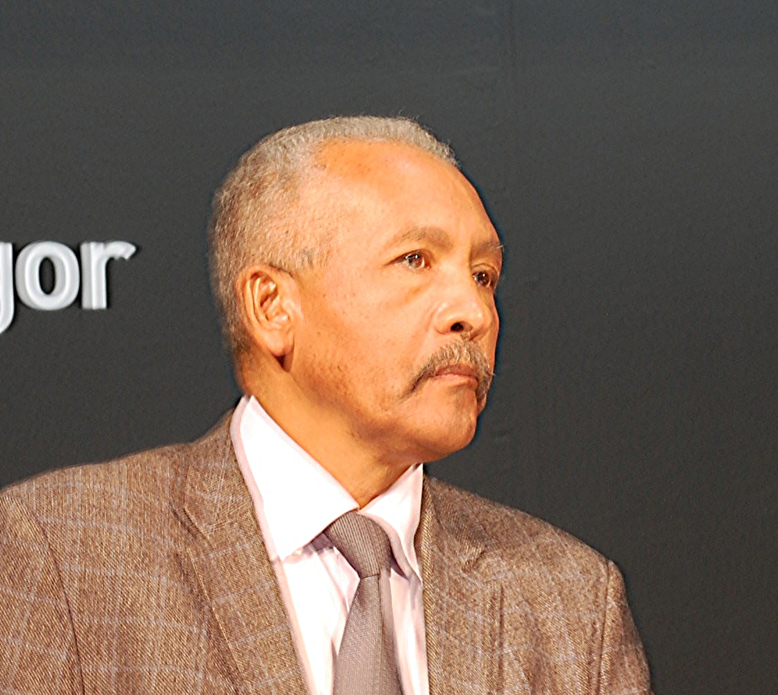 José Luis Mendonça på bokmässan 2017 i Göteborg.